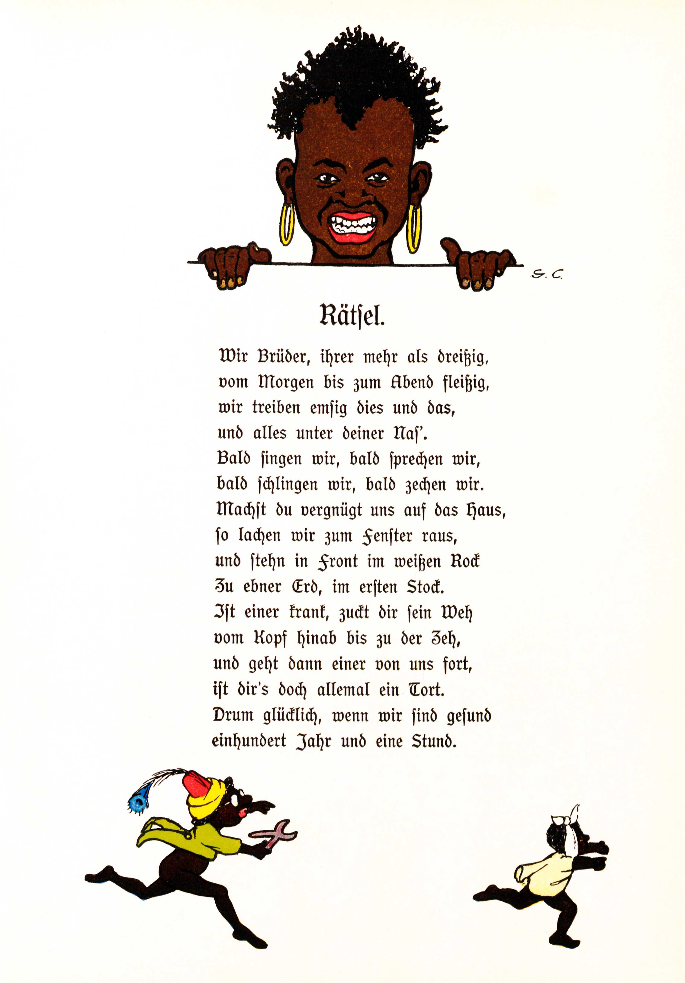 Gertrud Caspari Frühling Rätsel